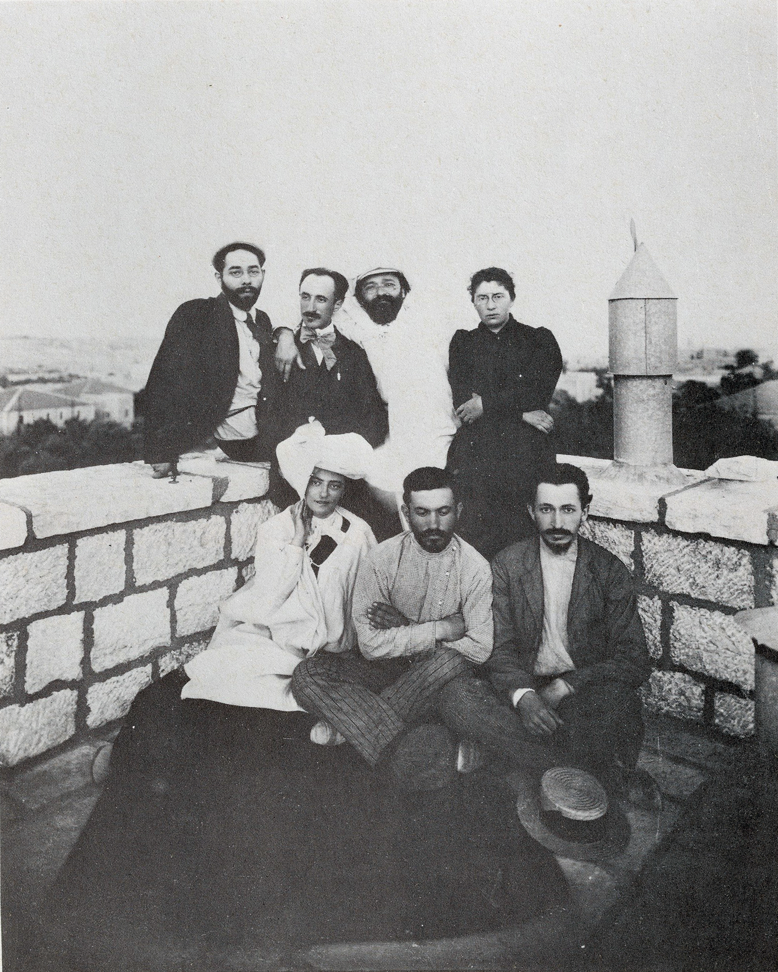 על גג "בצלאל", 1908 בקירוב. יושבים: יצחק בן-צבי (מימין), אירה יאן (?, משמאל); עומדים: רחל ינאית בן -צבי (מימין), שץ (במרכז). תצלום מאוסף מוזיאון ישראל.